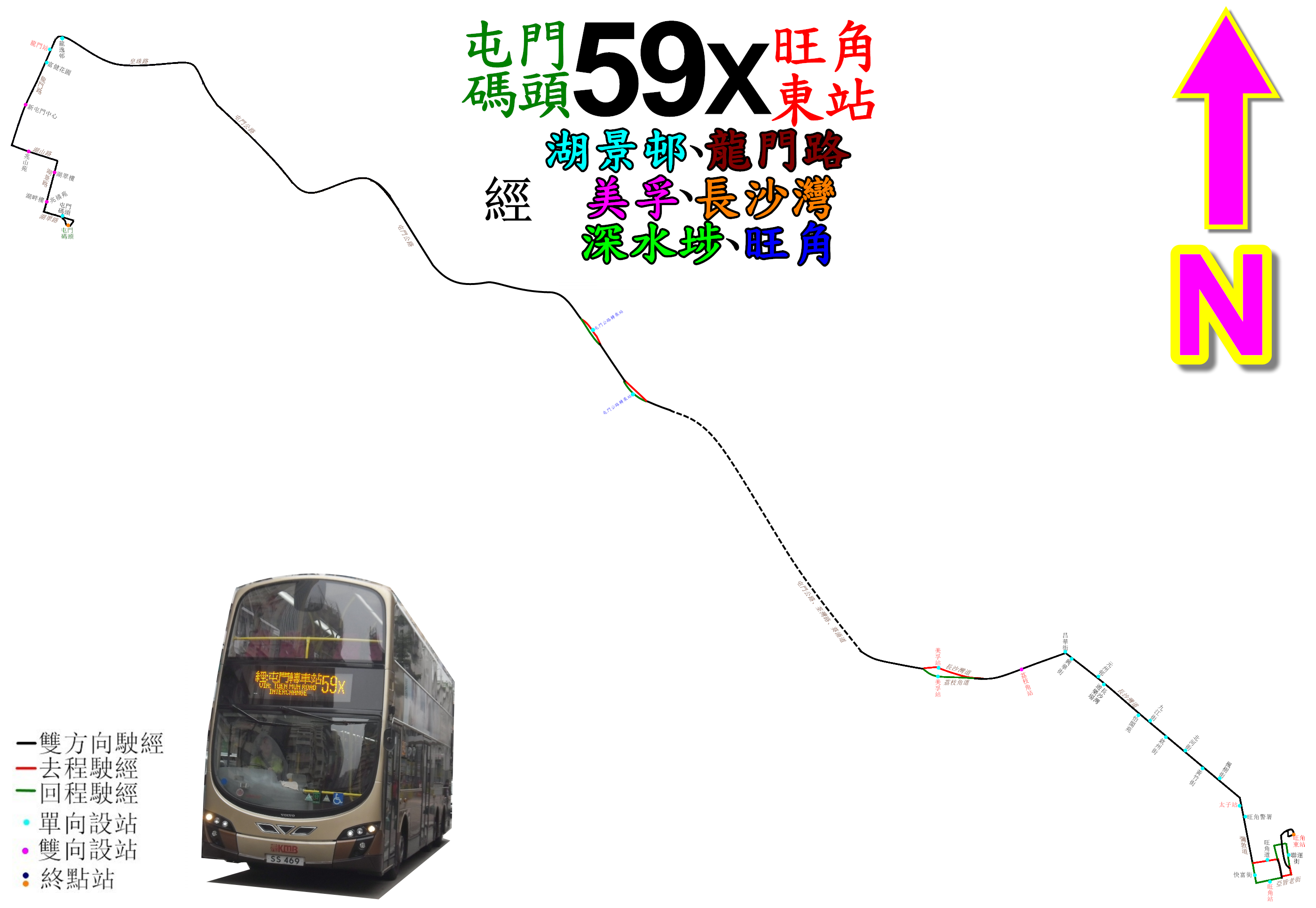 中文（香港）: 九巴59X線的走線圖